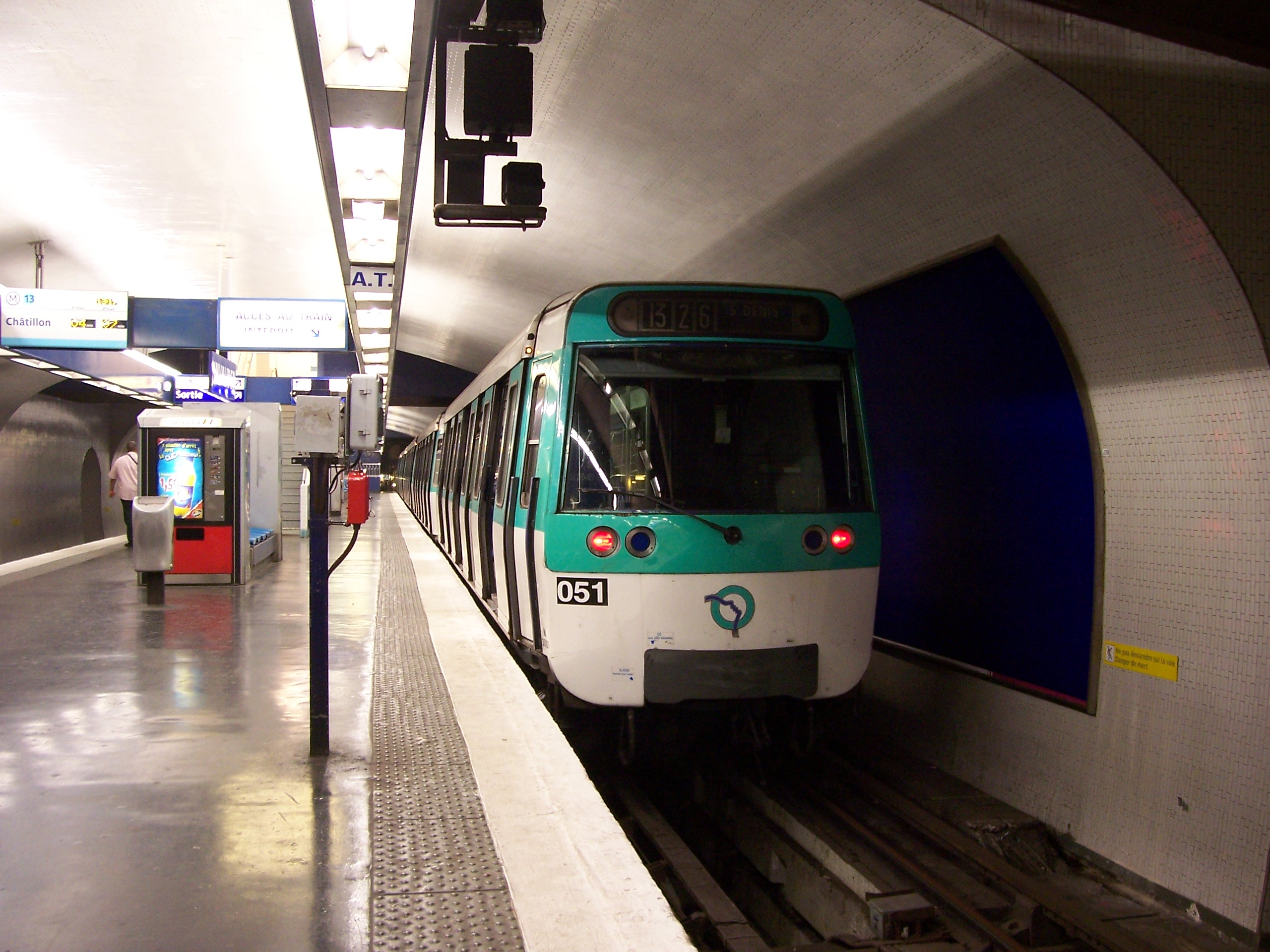 Invalides Metrolijn 13